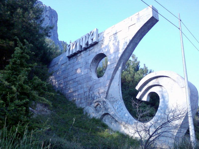 Знак при в'їзді у Велику Ялту на трасі М18 (Е105) з боку Севастополя